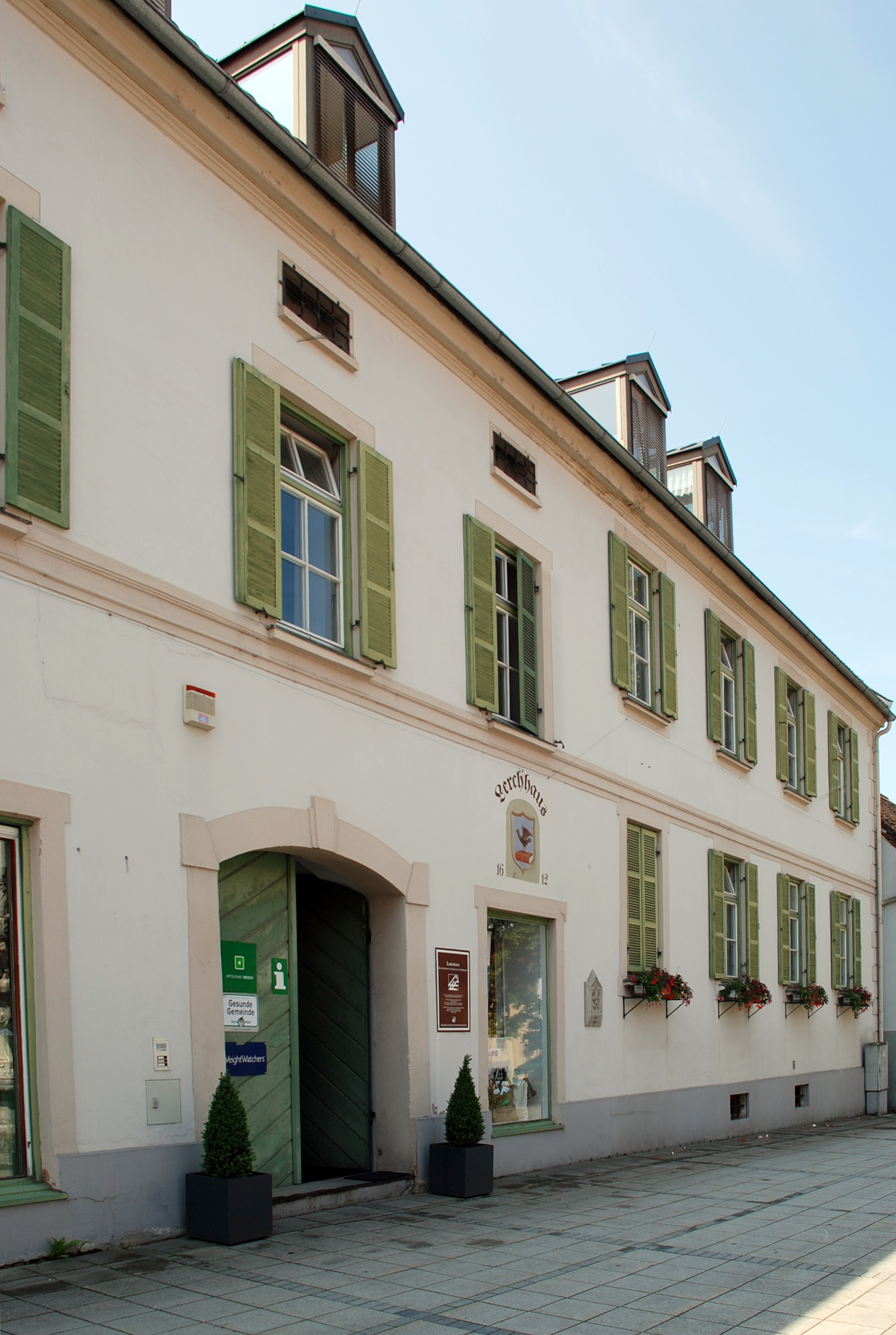 Eibiswald, Steiermark, Österreich: Lerchhaus